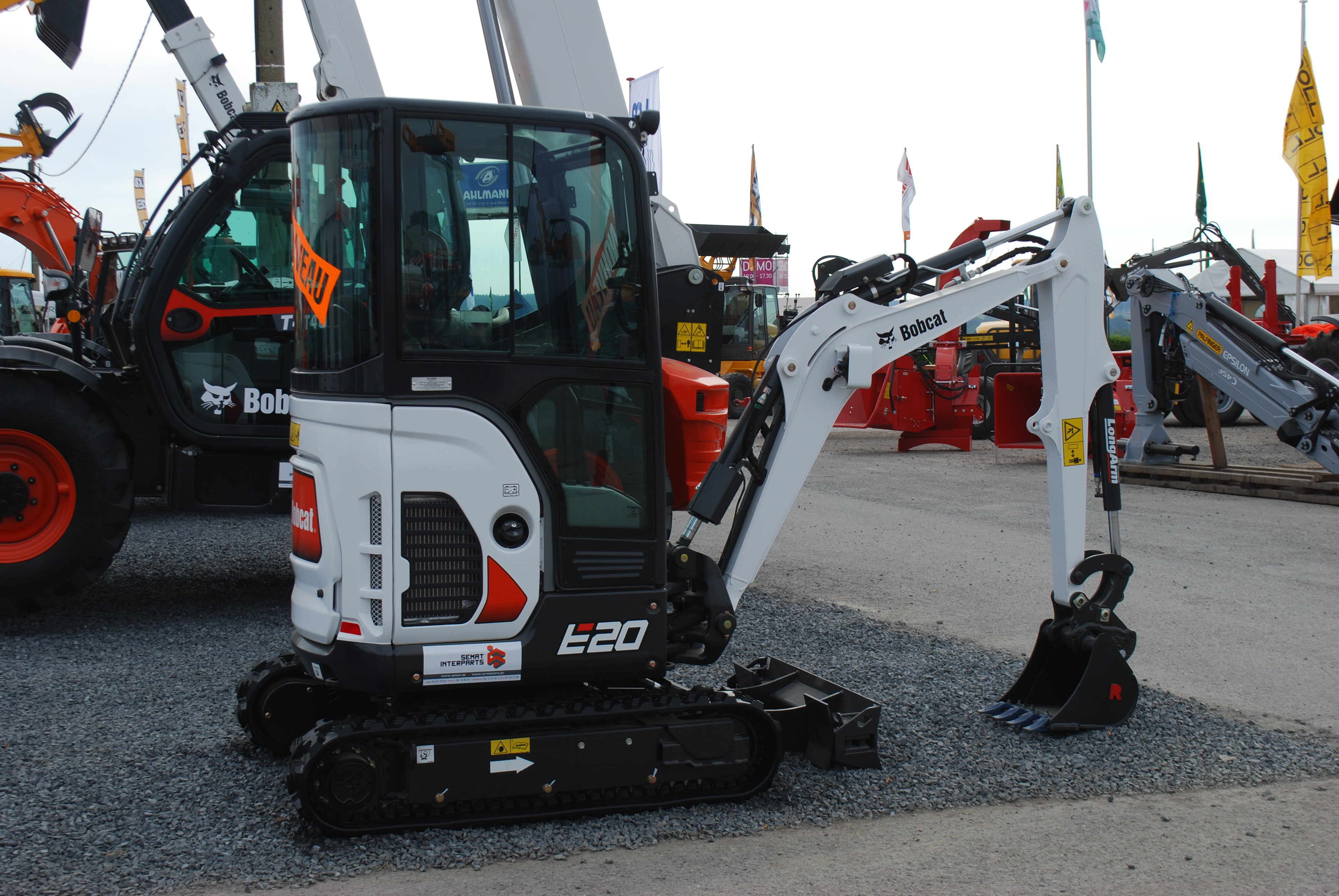 Vue de la 81e foire agricole de Libramont, en 2015.